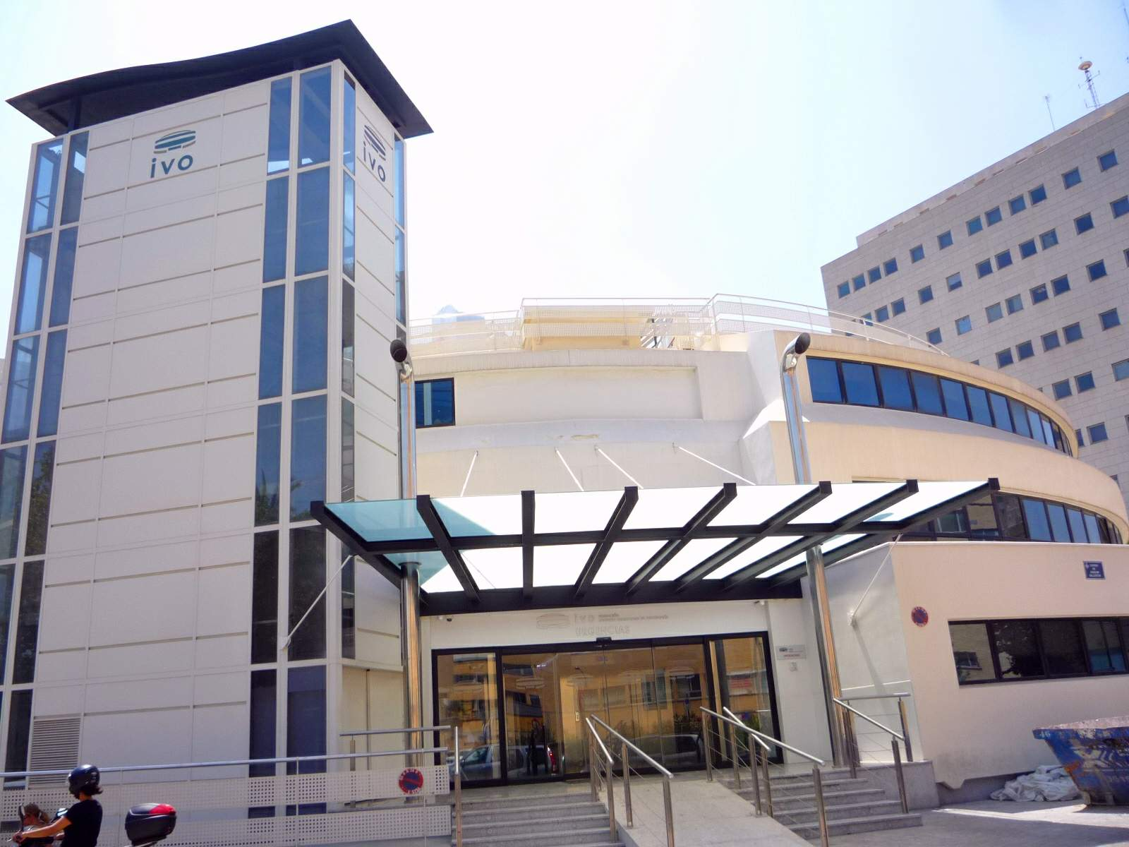 Instituto Valenciano de Oncología (IVO), en Valencia